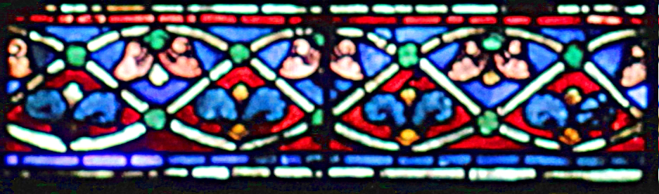 Extrait de